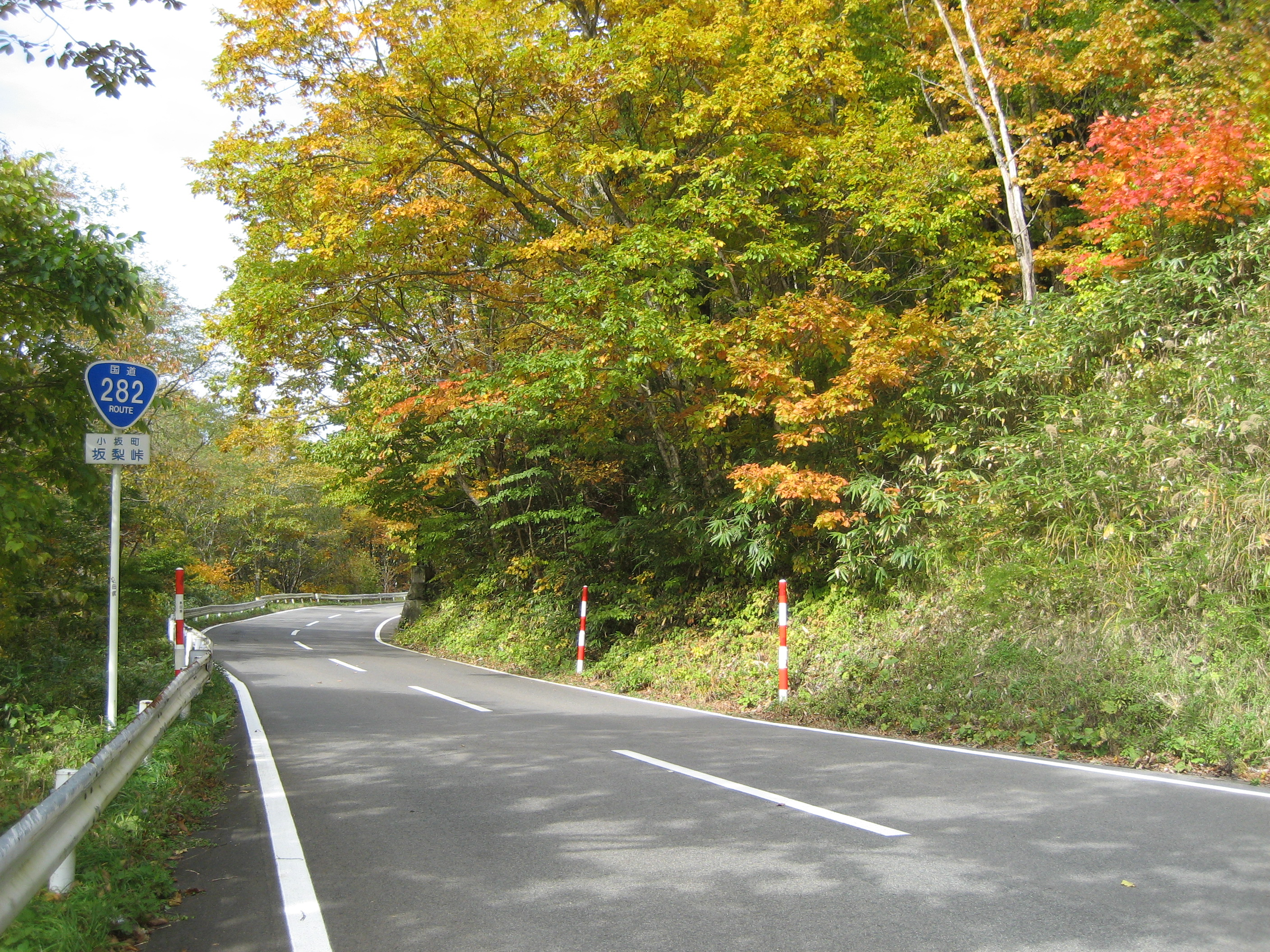 国道282号線秋田県小坂町坂梨峠付近